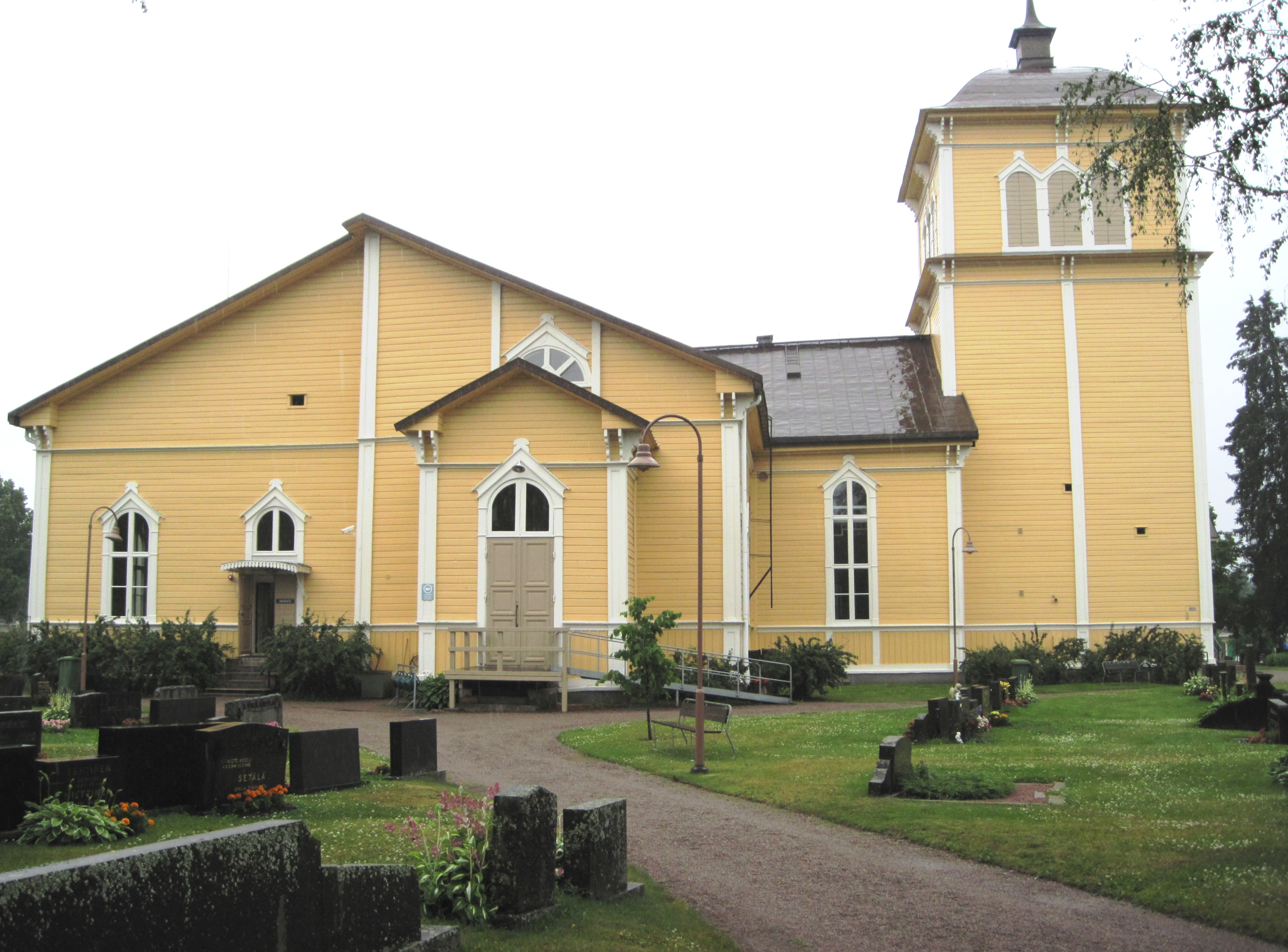 Eurajoen kirkko kesällä 2012